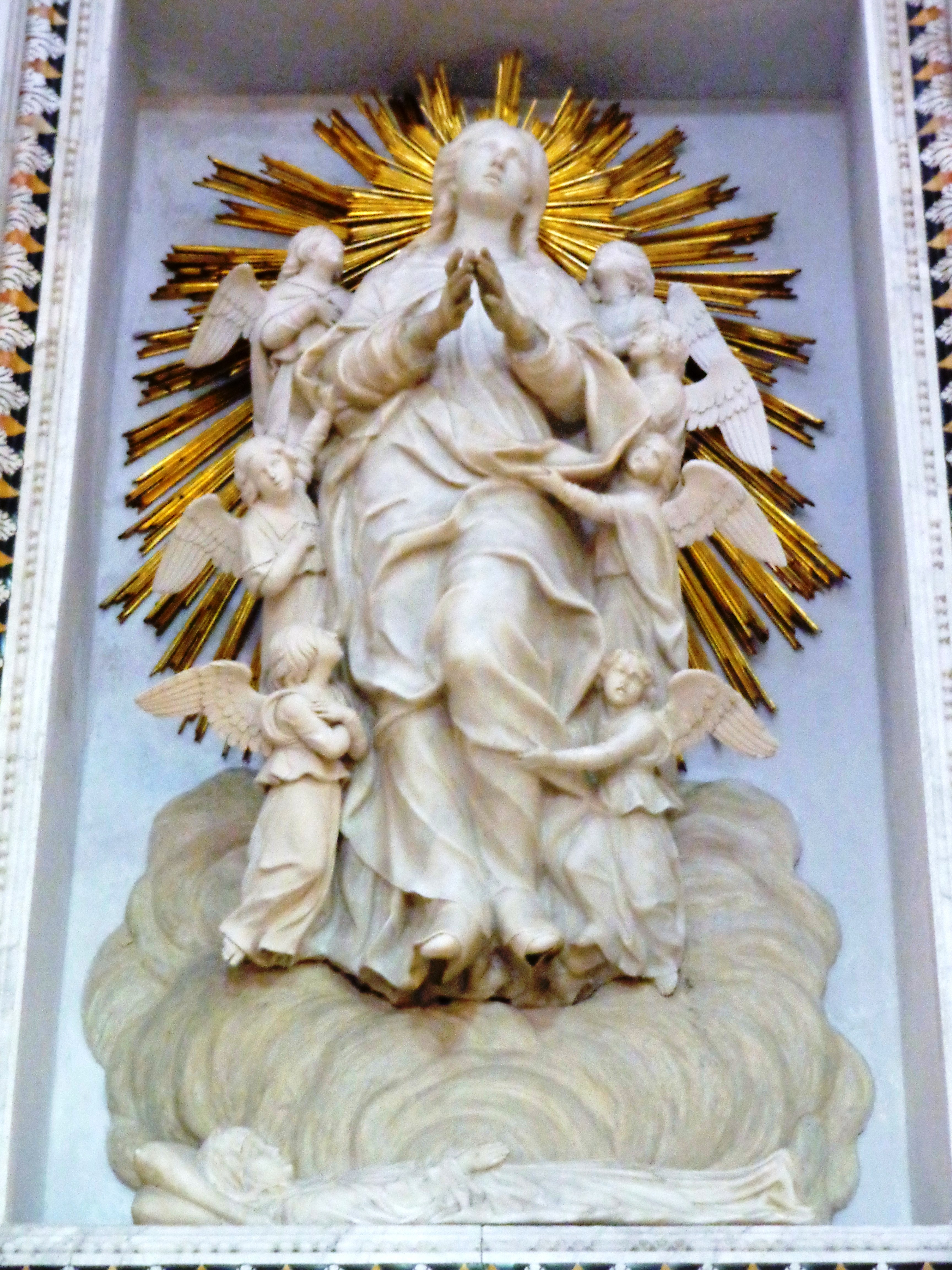 Cattedrale_PA_04